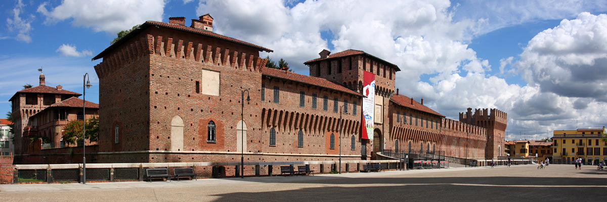 Panorama del Castello Sforzesco e di Piazza Vittorio Veneto a Galliate (NO)